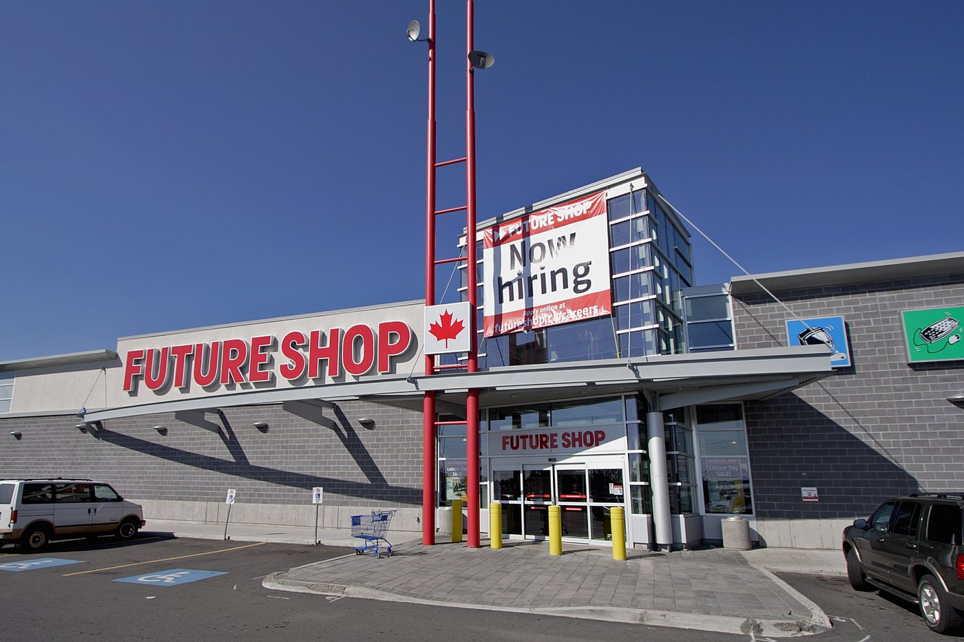 Future Shop